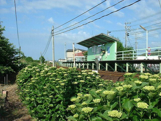 気賀高校前駅